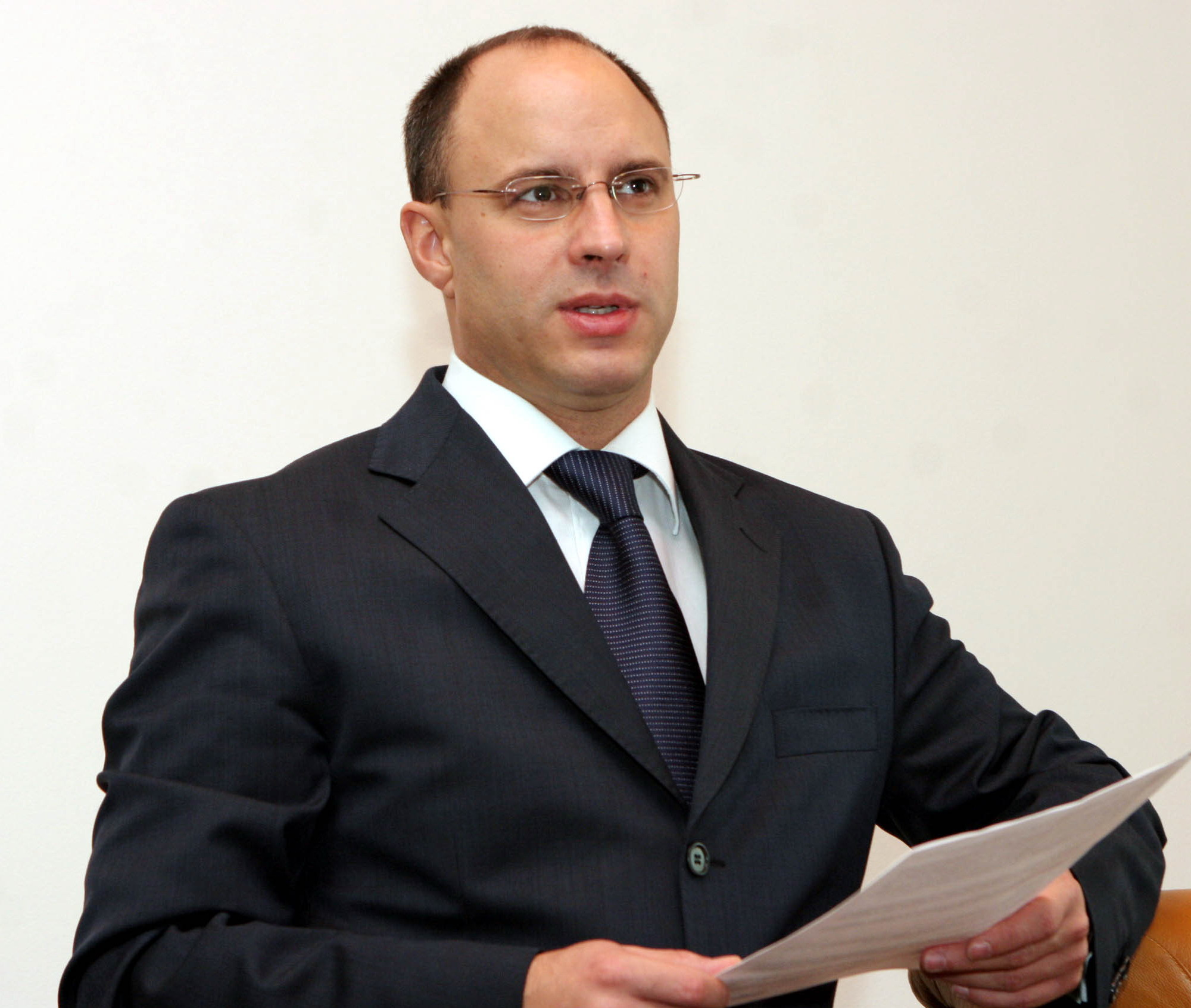 imagine proprie